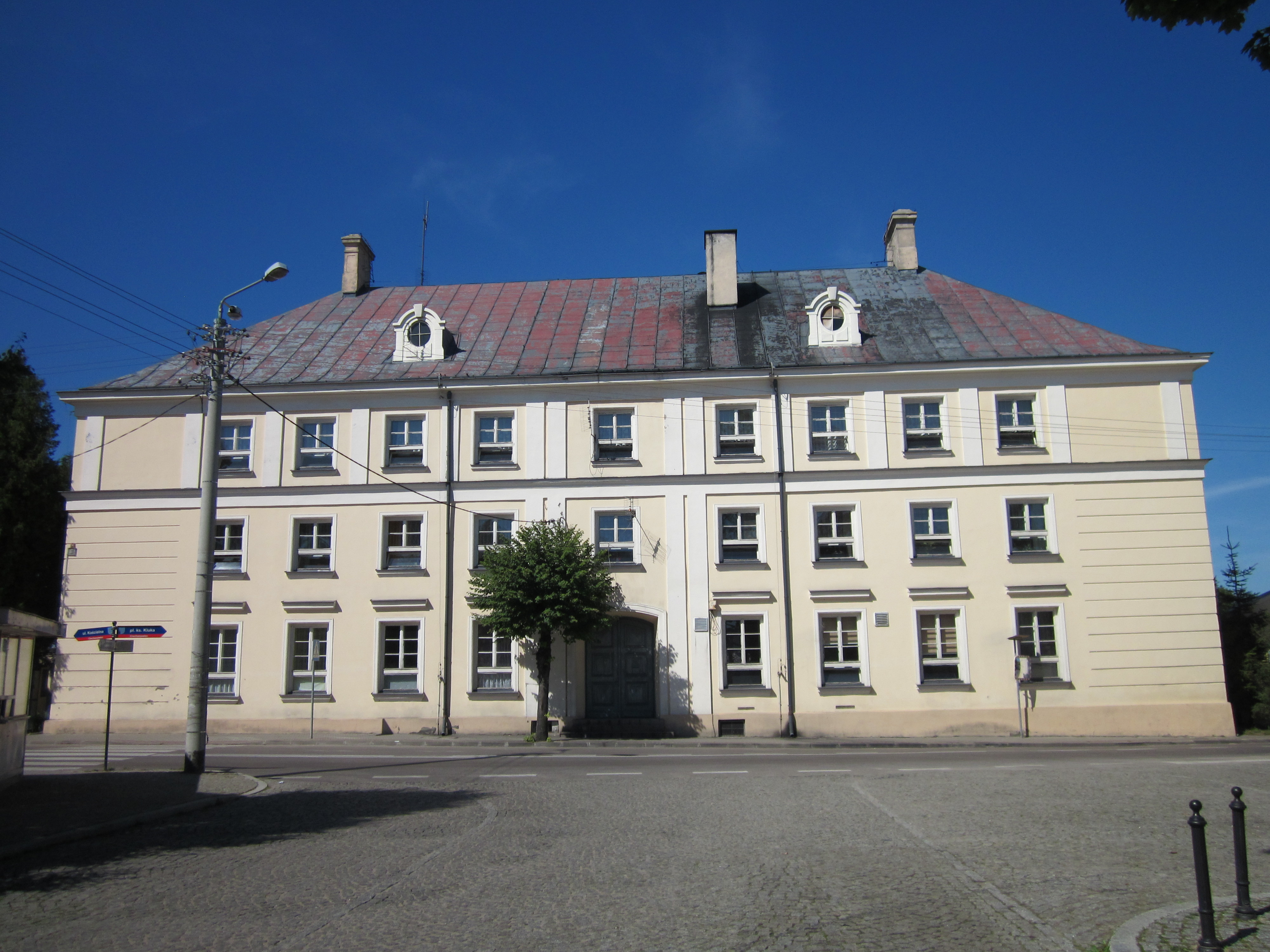 Klasycystyczny klasztor i szpital Szarytek z 1785-88 fundacji Teresy Ossolińskiej i Katarzyny Jabłonowskiej, odbudowany w 1954-60, wcześniej Szpital rejonowy obecnie Zakład pielęgnacyjno–opiekuńczy i opiekuńczo–leczniczy podlegający pod Szpital ogólny w Wysokiem Mazowieckiem.